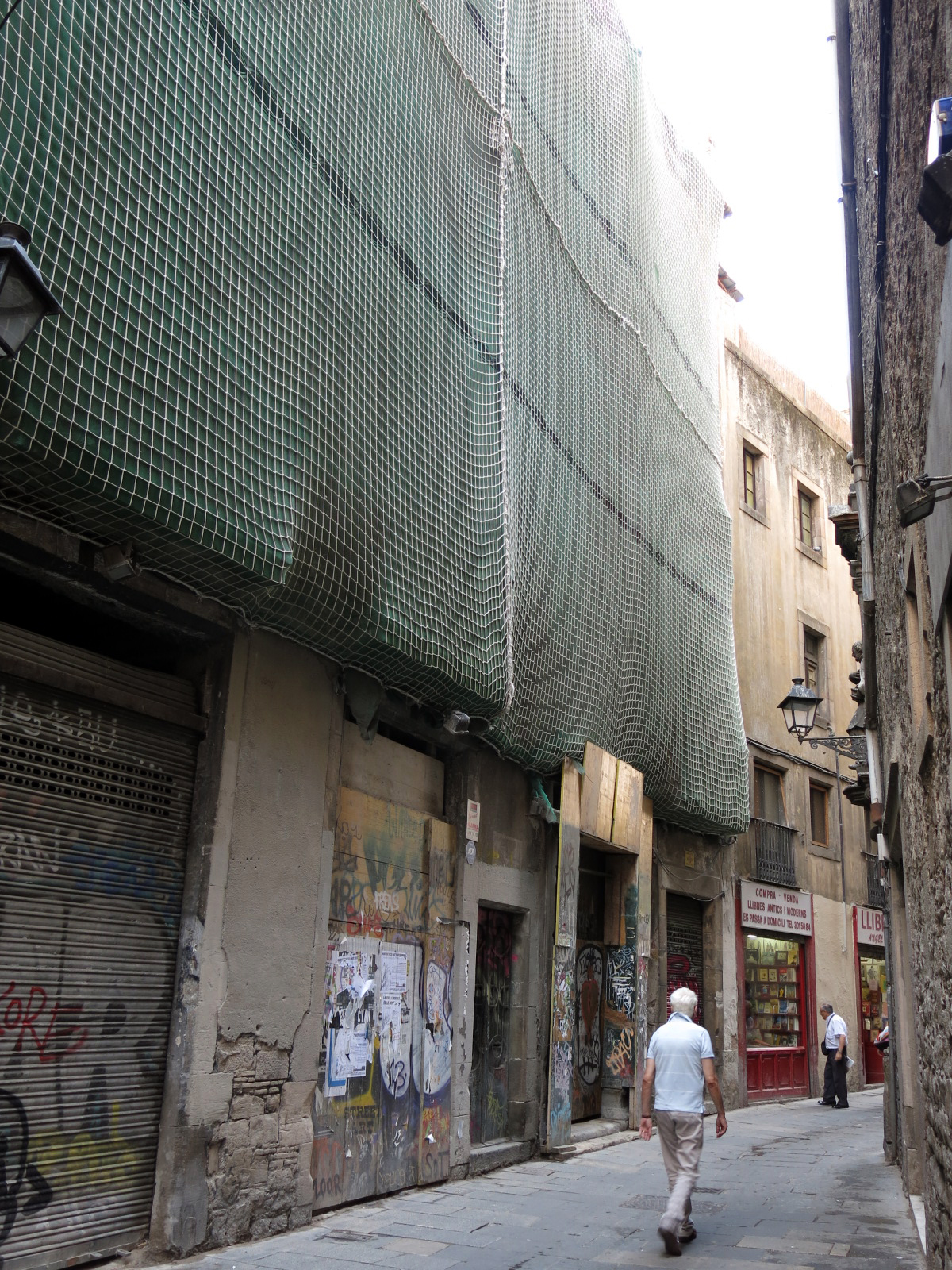 Antiga Capella de l'Hospital de Sant Sever (Barcelona) Object location41° 23′ 00.8″ N, 2° 10′ 27.58″ E